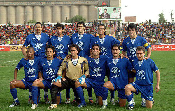 استقلال لیگ برتر